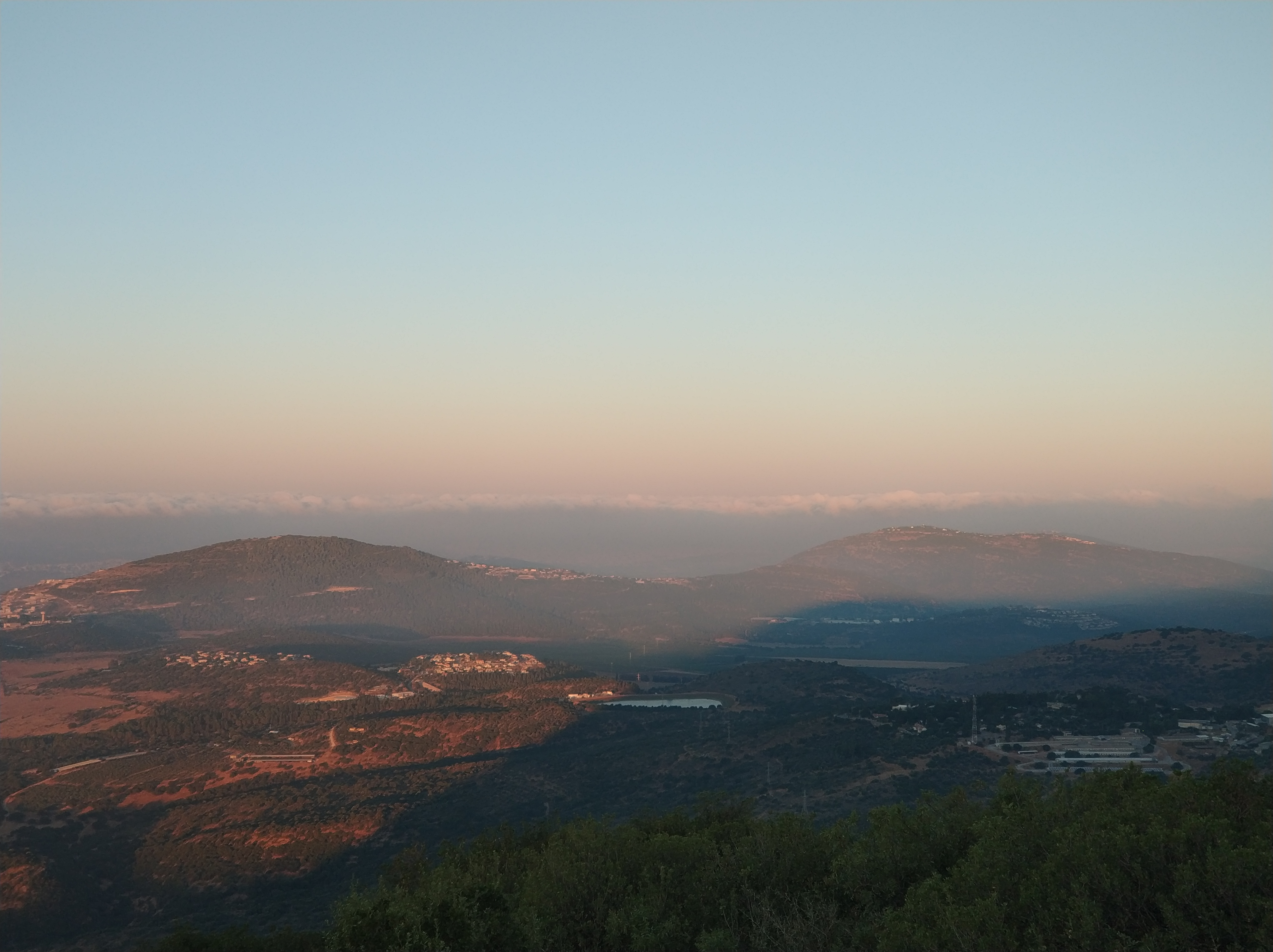 הר כמון מימין (מערב) הר חזון משמאל(מזרח)